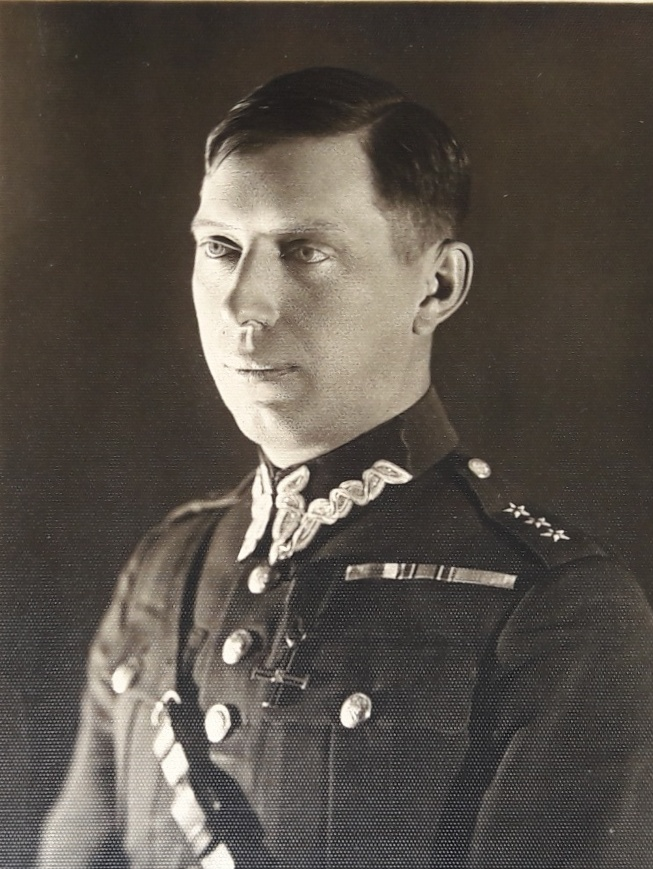 Leon Ast w roku 1934 - kpt. piech. (71 p. p.), wykładowca broni spec. w Szkole Podchorążych dla Podoficerów w Bydgoszczy.